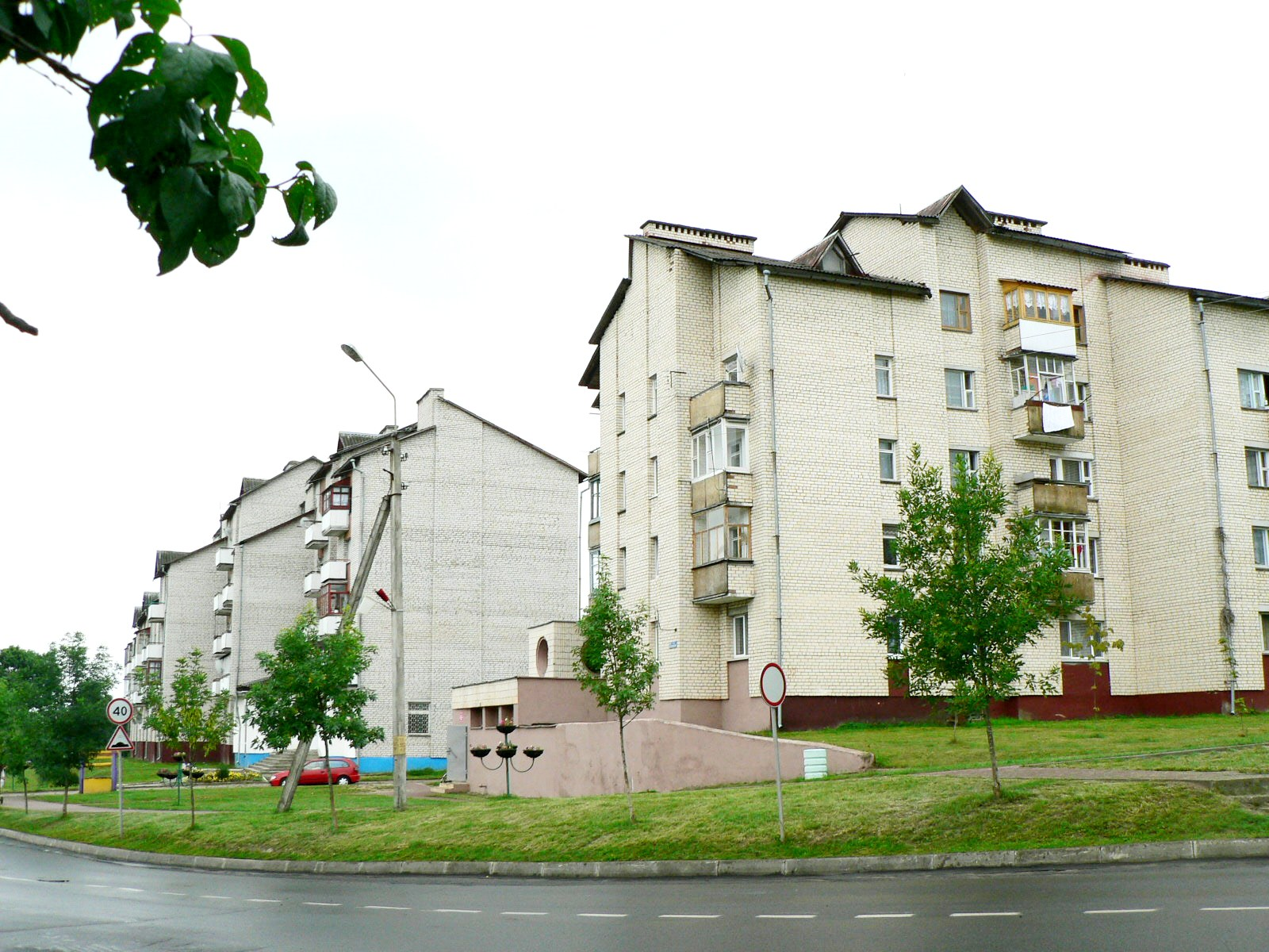 Bloki mieszkalne przy ulicy Lenińskiej w Kupie nad jeziorem Narocz, na Białorusi. Беларуская (тарашкевіца): Жылые колькіпаверховыя будынкі гарацкога кштаўту, пры вуліцы ленінскай у Купе, шта над Нарочю.